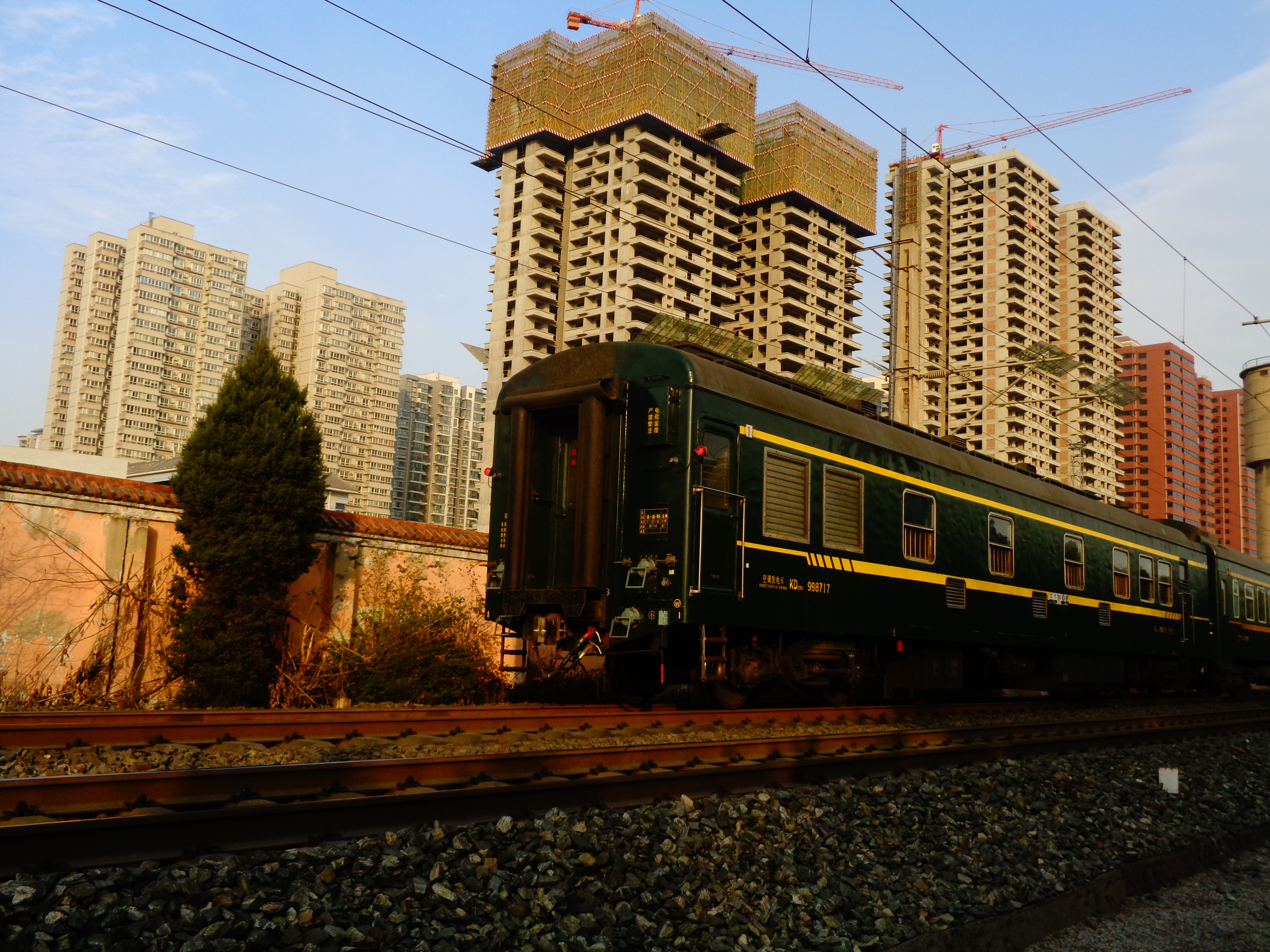 西安市莲湖区小北门附近的陇海铁路，大西瓜牵引，车厢里面是空的